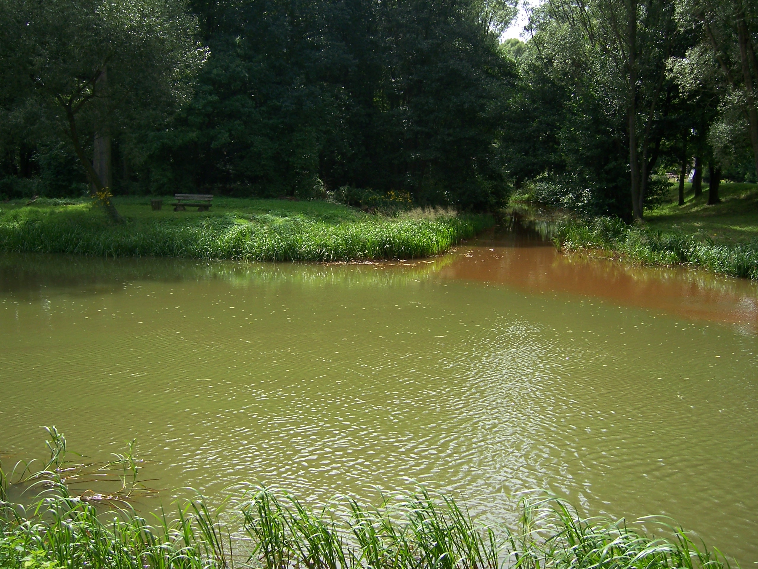 Zusammenfluss von Kleiner Spree und Großer Spree in Spreewitz (Oberlausitz, Sachsen) Hornjoserbsce: Zjednoćenje Sprjewje a Sprjewicy w Šprjejcach. Map: 51° 30′ 34″ N, 14° 24′ 15″ E